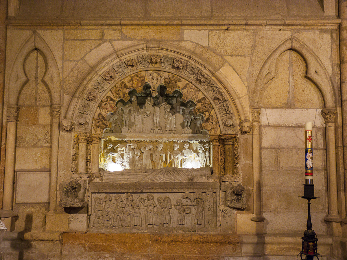 08082013 174034 LEÓN 0232